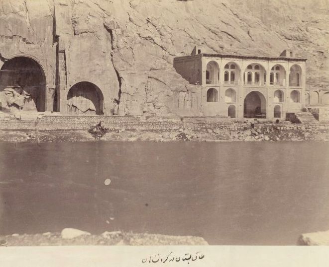 Tags Boston, Kermanshahan, Iran fin 19e